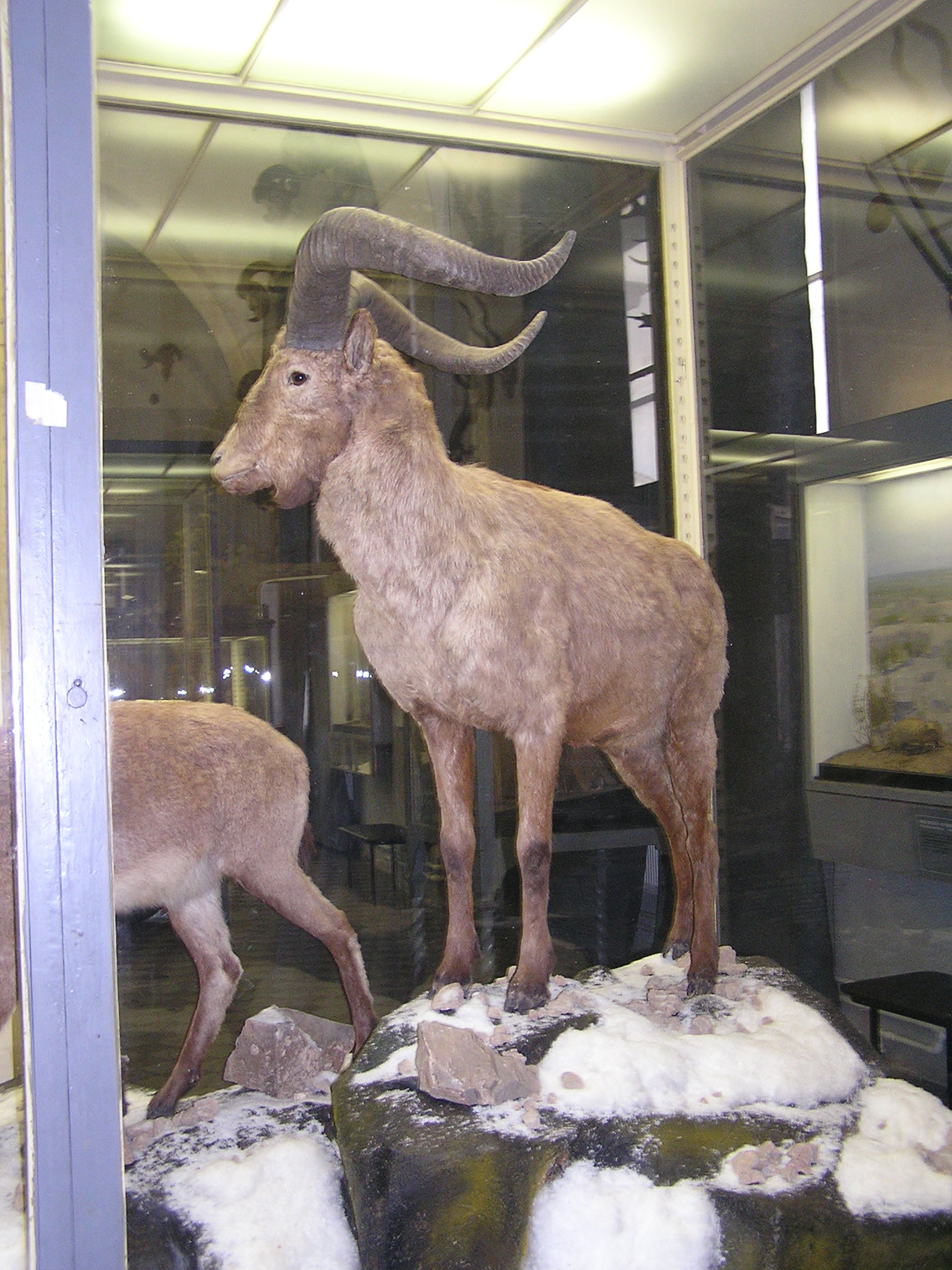 Зоологический музей в Санкт-Петербурге. Козел